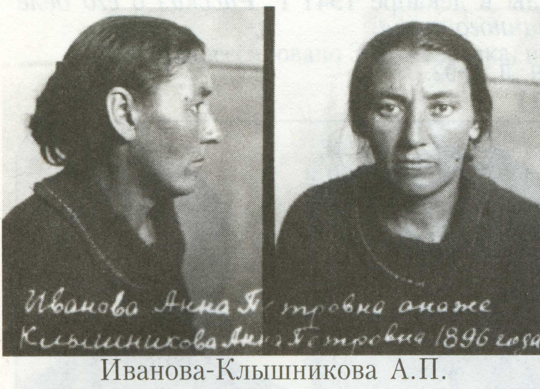 Анна Петровна Иванова-Клышникова. Репрессирована в годы сталинских репрессий как жена священнослужителя - П. В. Иванова-Клышникова - сопредседателя Союза баптистов СССР.